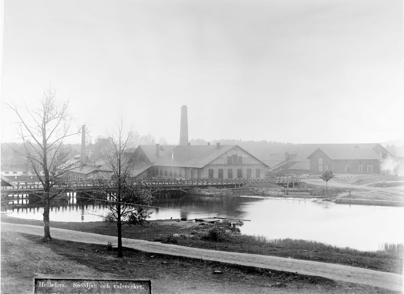 B14446. Smedjan och valsverket vid Hellefors Bruks AB. Fotografiet är skänkt till Tekniska museet från Svenska Turistföreningen.